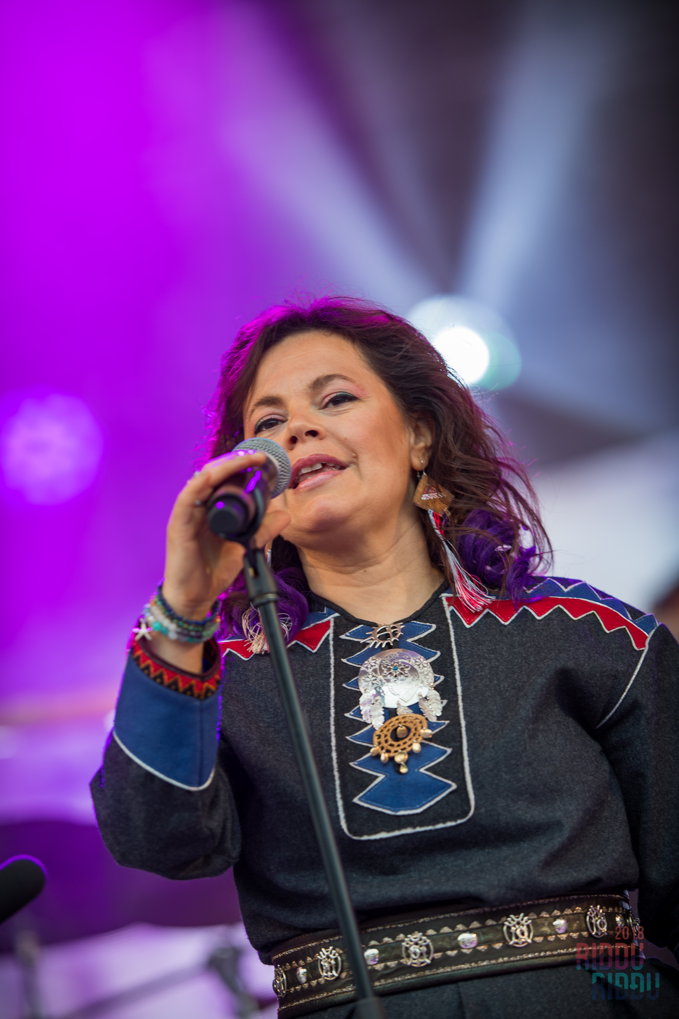 Solju at Riddu Riđđu 2018